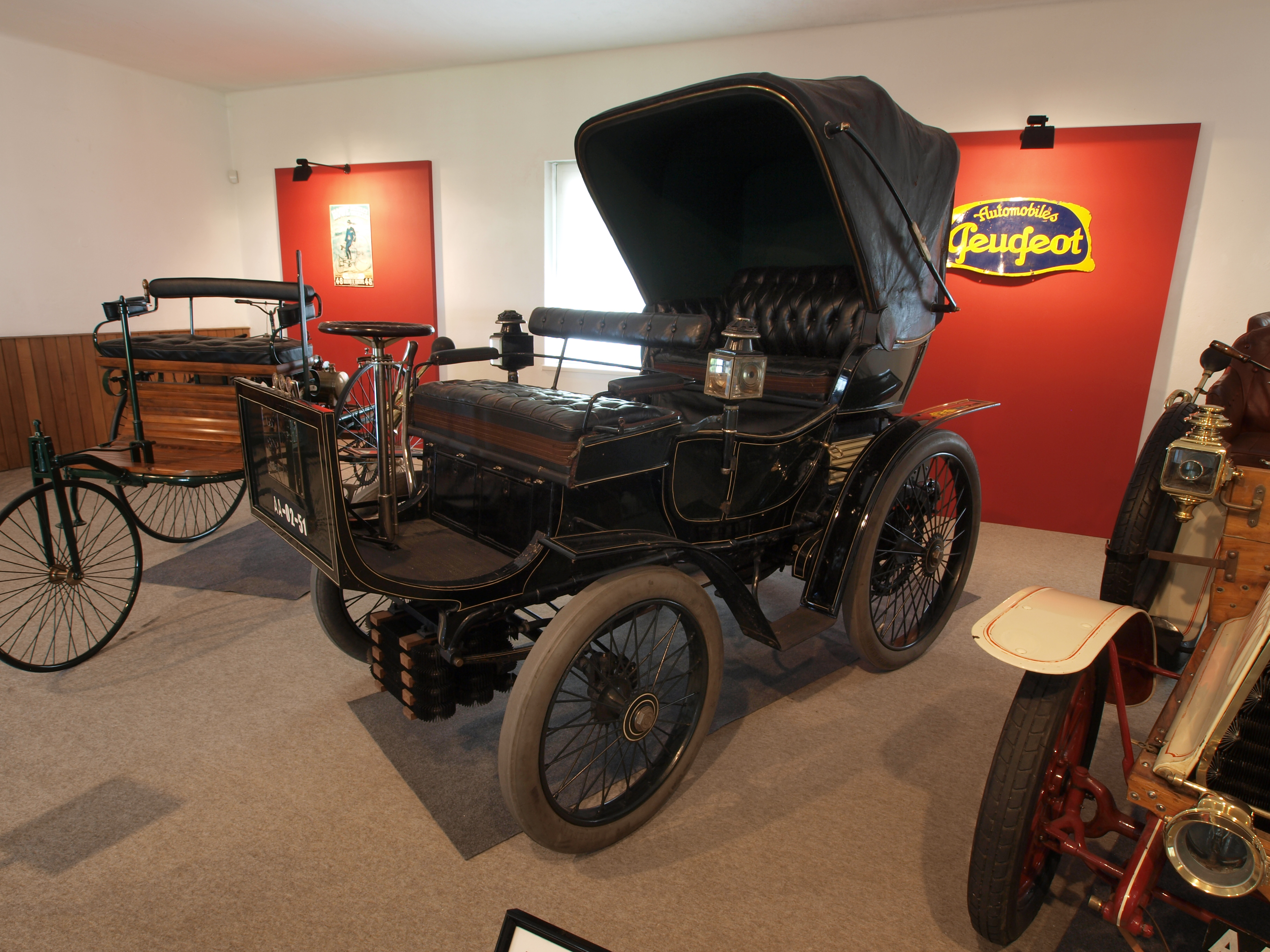 Photographed at the Caramulo museum, 'Museu do Caramulo', Caramulo, Portugal. OLYMPUS DIGITAL CAMERA